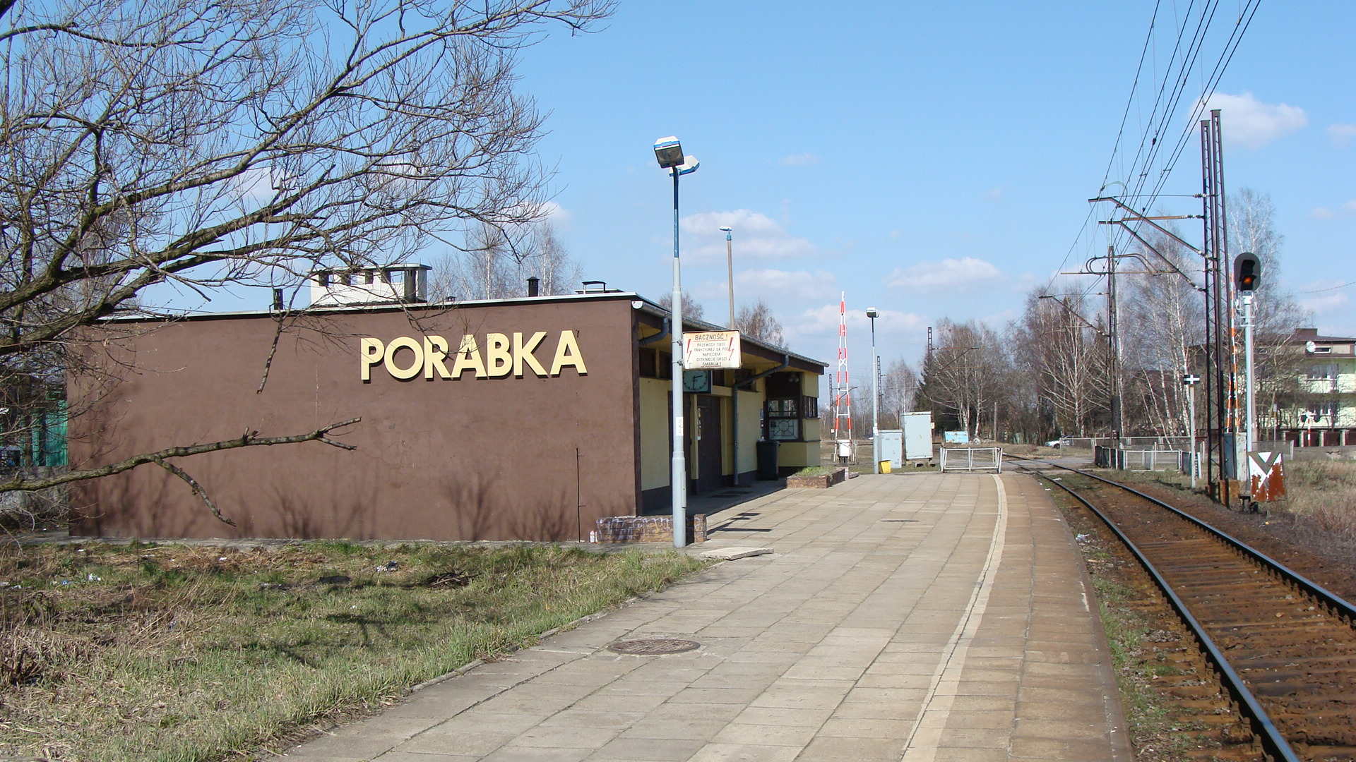 Železniční stanice Sosnowiec-Porabka, Polsko